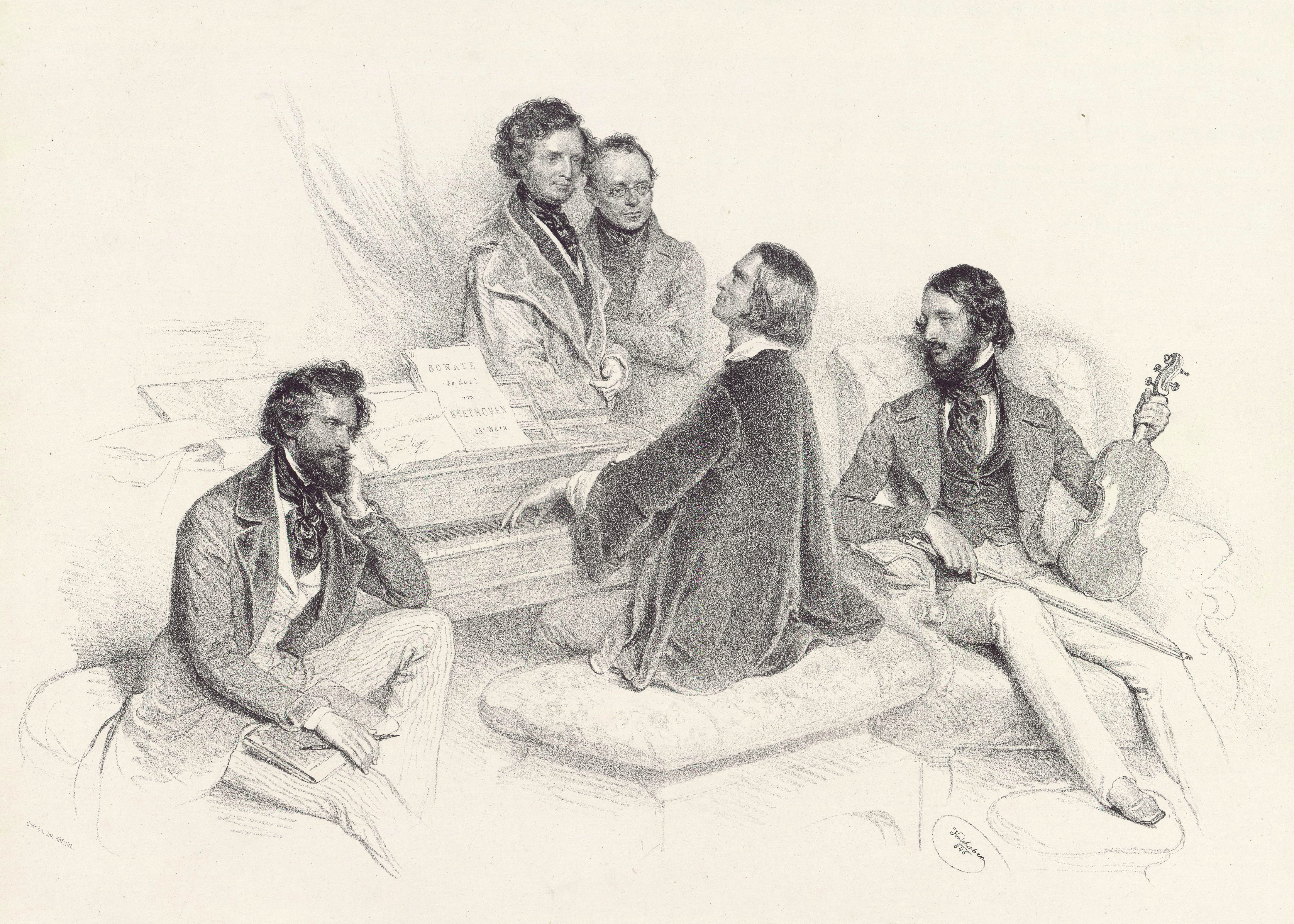 From left to right: Joseph Kriehuber, Hector Berlioz, Carl Czerny, Franz Liszt, Heinrich Wilhelm Ernst.